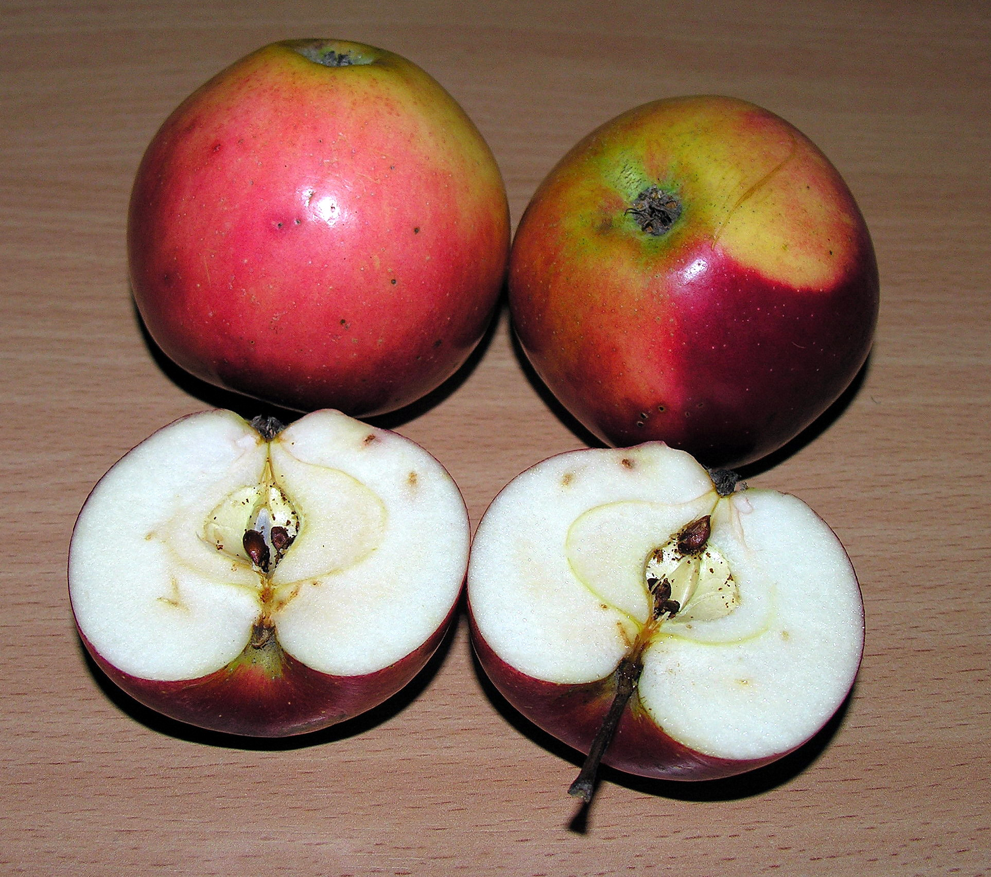 Lofem 2008 m. sausio 24 d., Lietuva